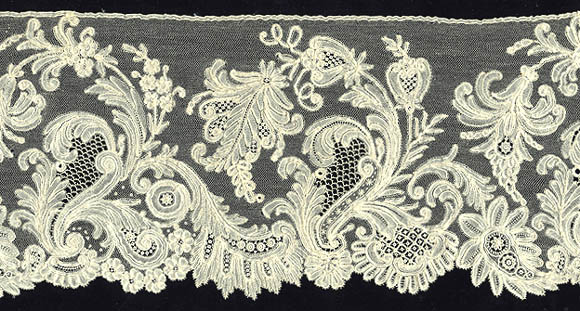 eigen foto, kant